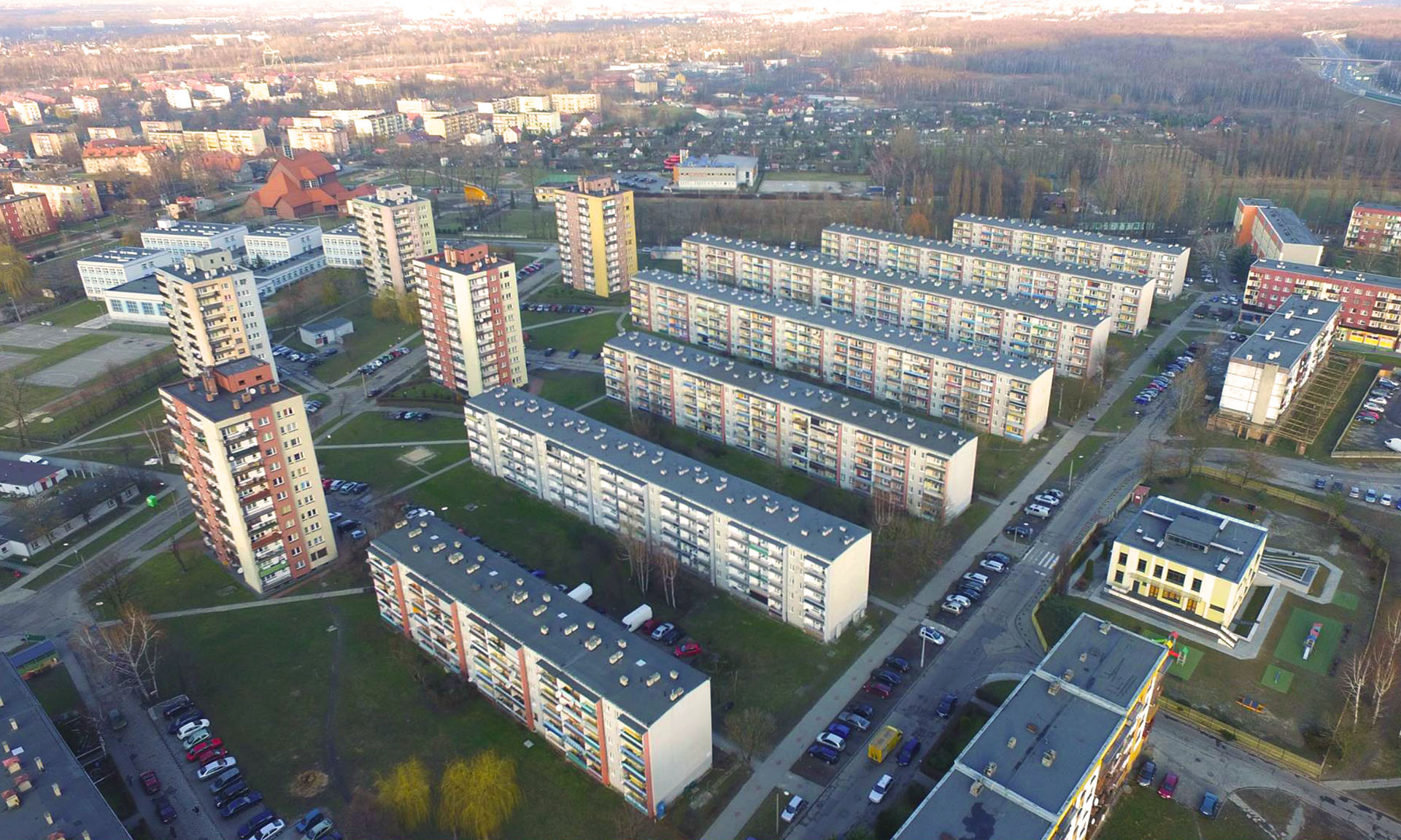 Nowa część sośnicy. W tle parafia św. Jacka, Gimnazjum nr. 6 oraz Stadion KS Sośnica. Zdjęcie z lotu dronem